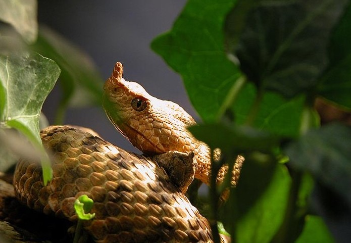 Selbst fotografiert. Aufgenommen mit einer Nikon Coolpix 5700 im Rheinsberger Terra-Zoo. Fotograf/Quelle: Wilfried Berns / Motiv: Hornviper (Vipera ammodytes)